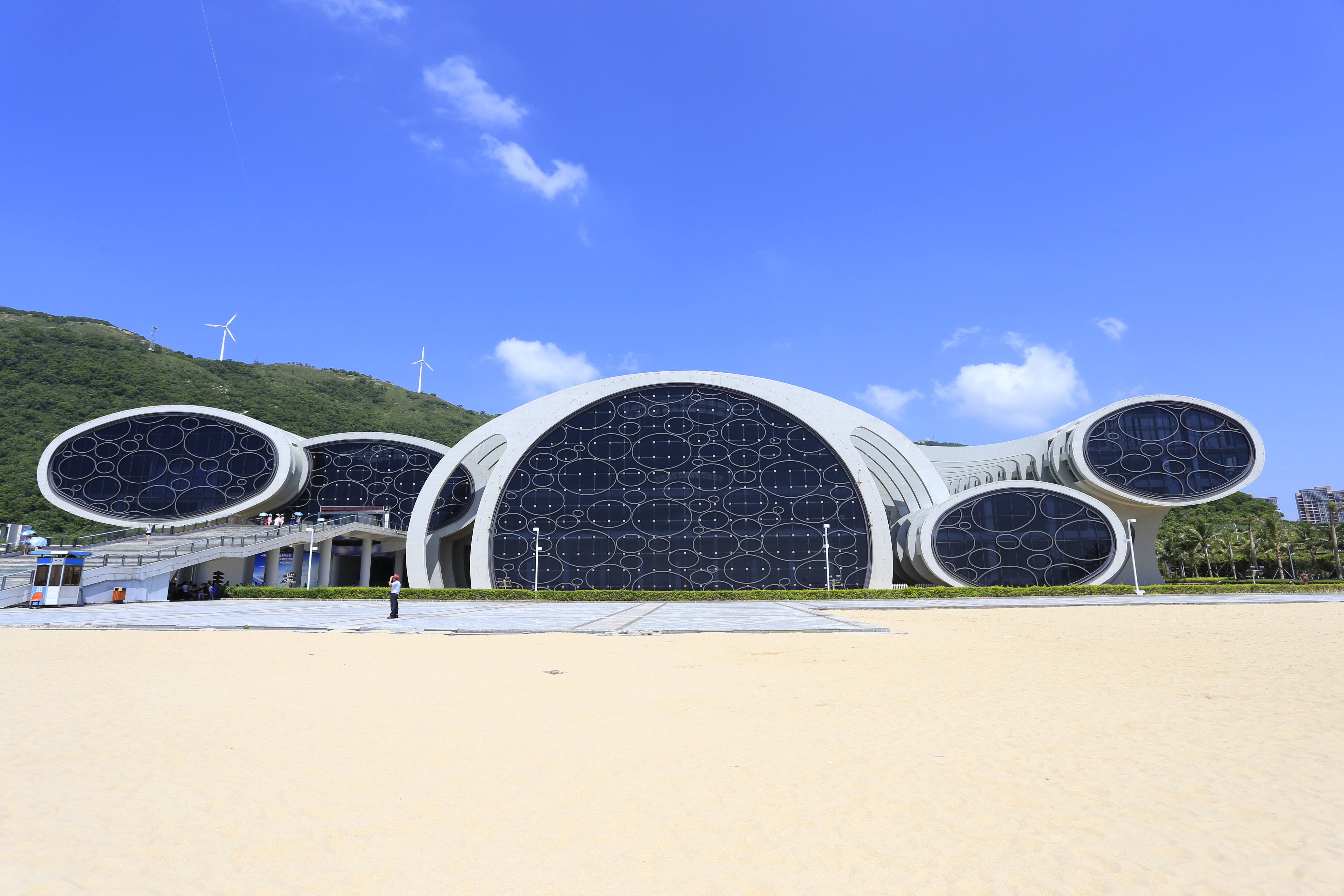 阳江海陵岛“南海一号”